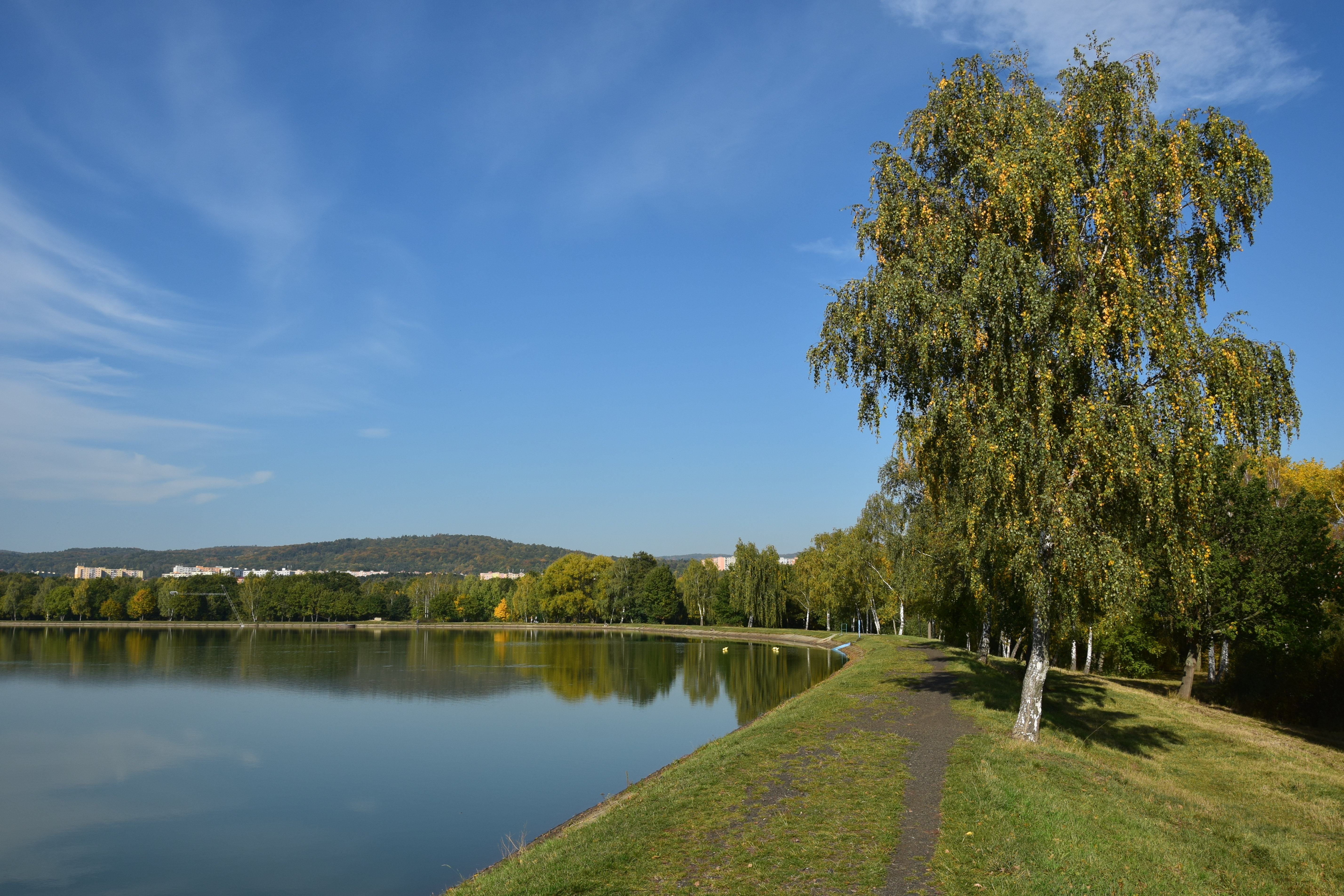 Chomutov – Velký otvický rybník